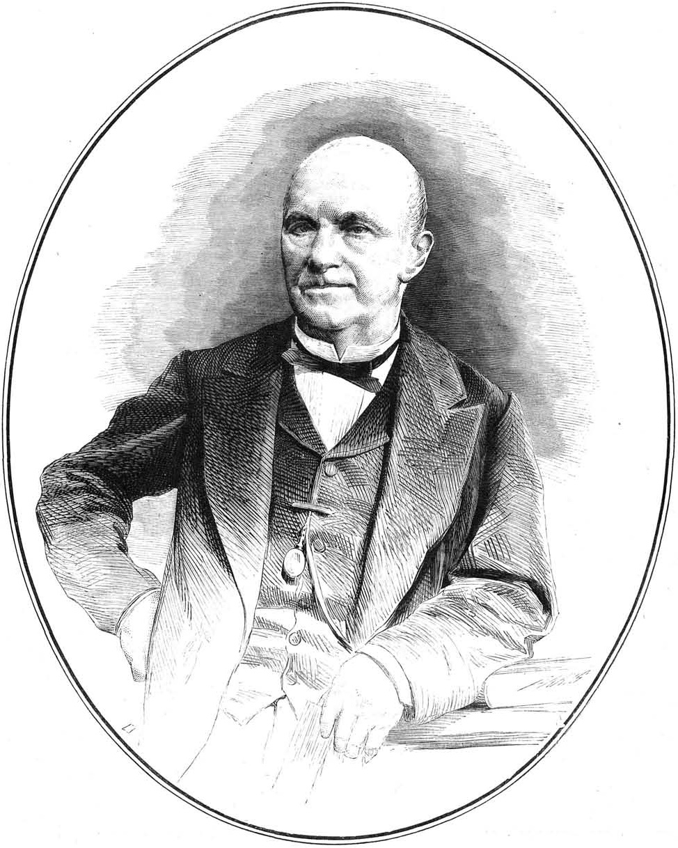 Juan Manuel de Manzanedo, primer duque de Santoña. Grabado de Marcelo París, La Ilustración Española y Americana, 22 de octubre de 1876